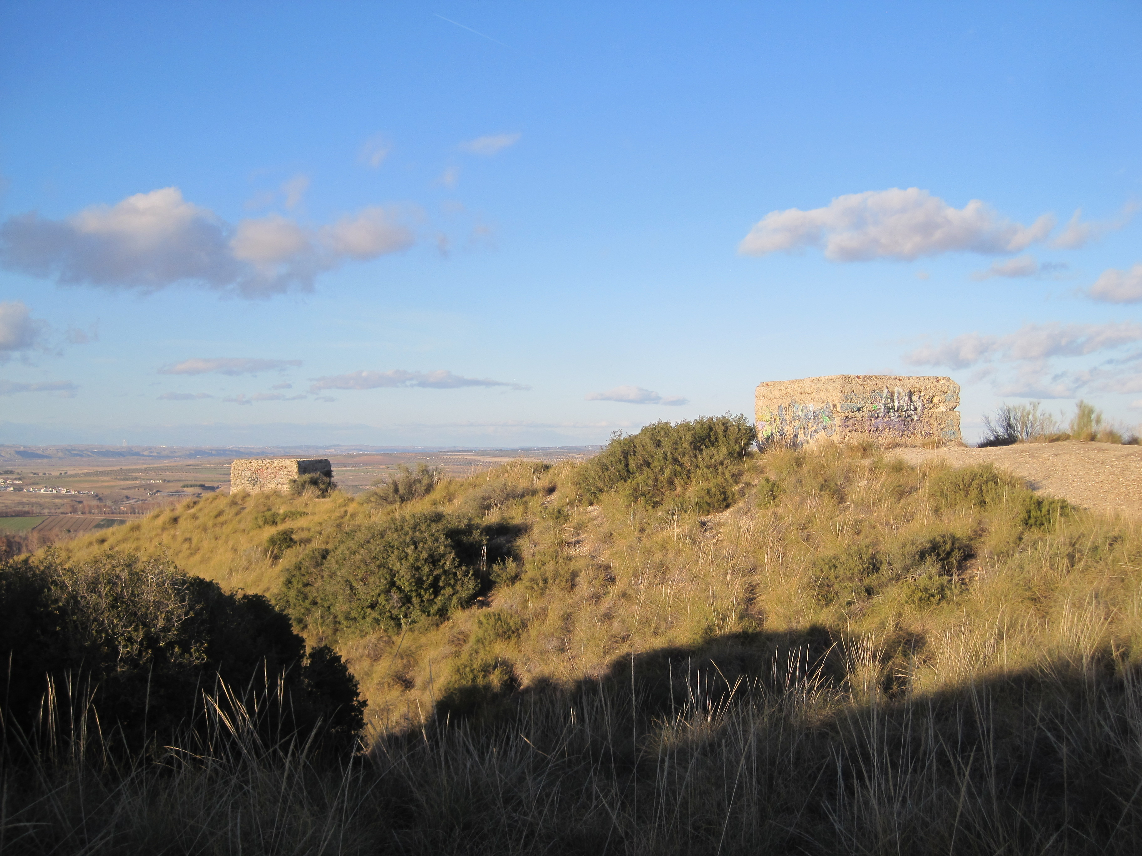 Cerro de Valdelascasas (Aranjuez). Búnqueres de la Guerra Civil.